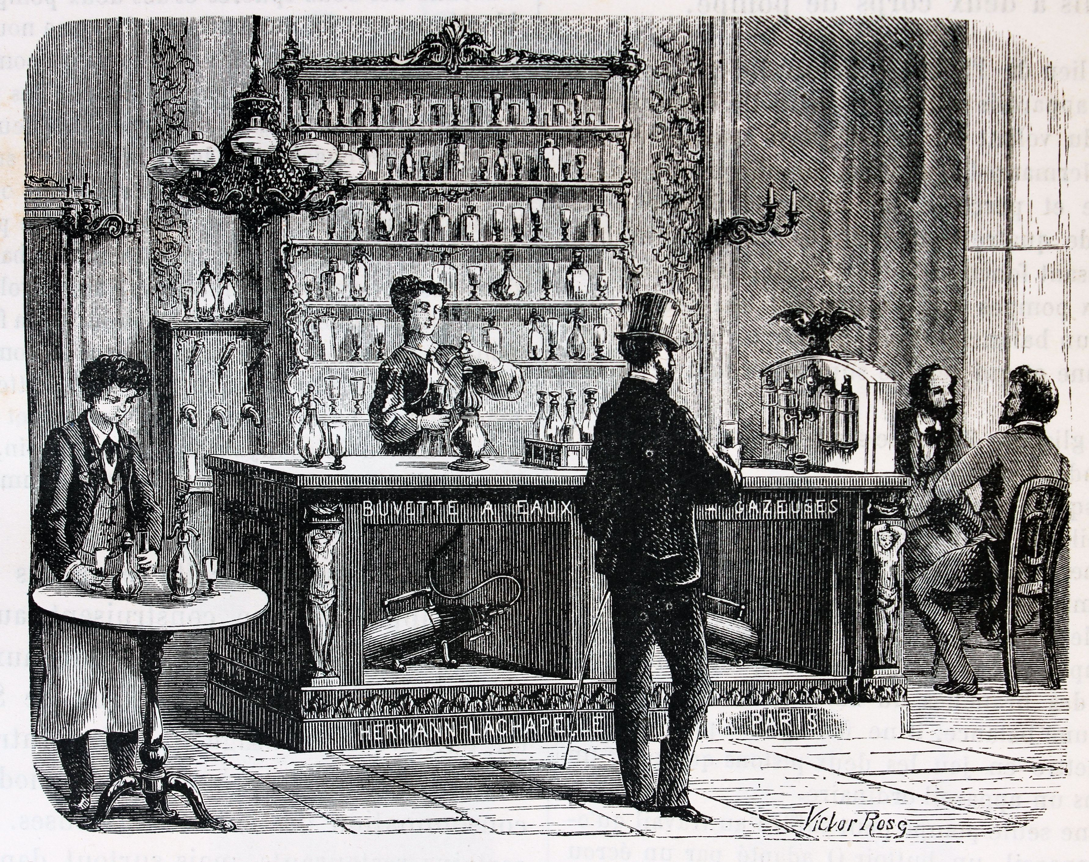 Ilustraciones de la obra : Les merveilles de l'industrie ou, Description des principales industries modernes / par Louis Figuier. - Paris : Furne, Jouvet, [1873-1877]. - Tome III